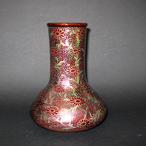 céramique irrisée zumbo 1° période